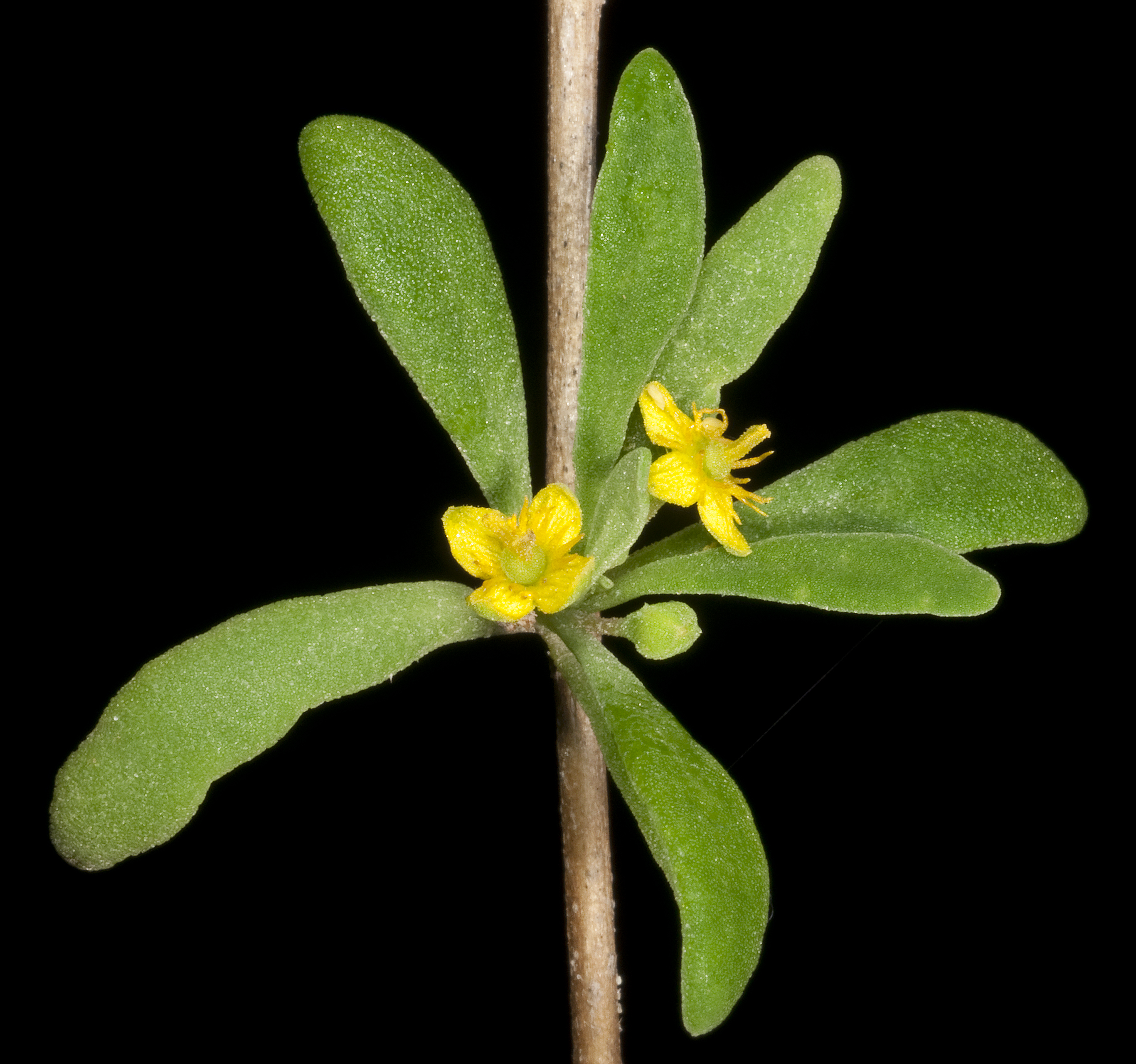 KRT4542